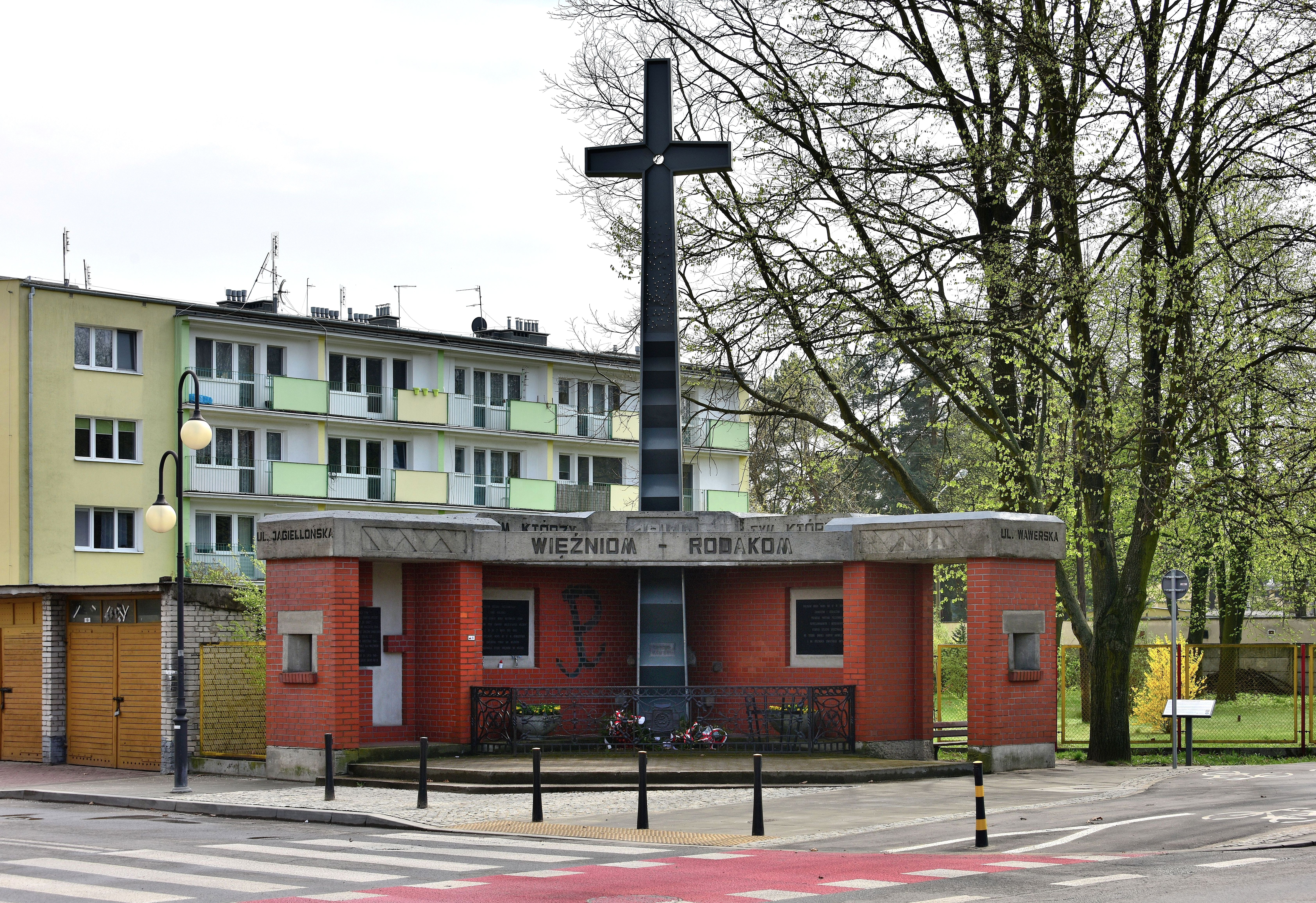 Pomnik ofiar obozu NKWD przy ul. Marsa w Rembertowie